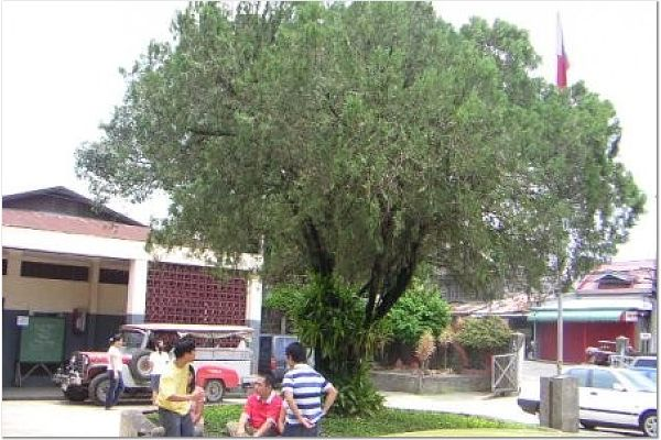 Mabini Academy: batibot